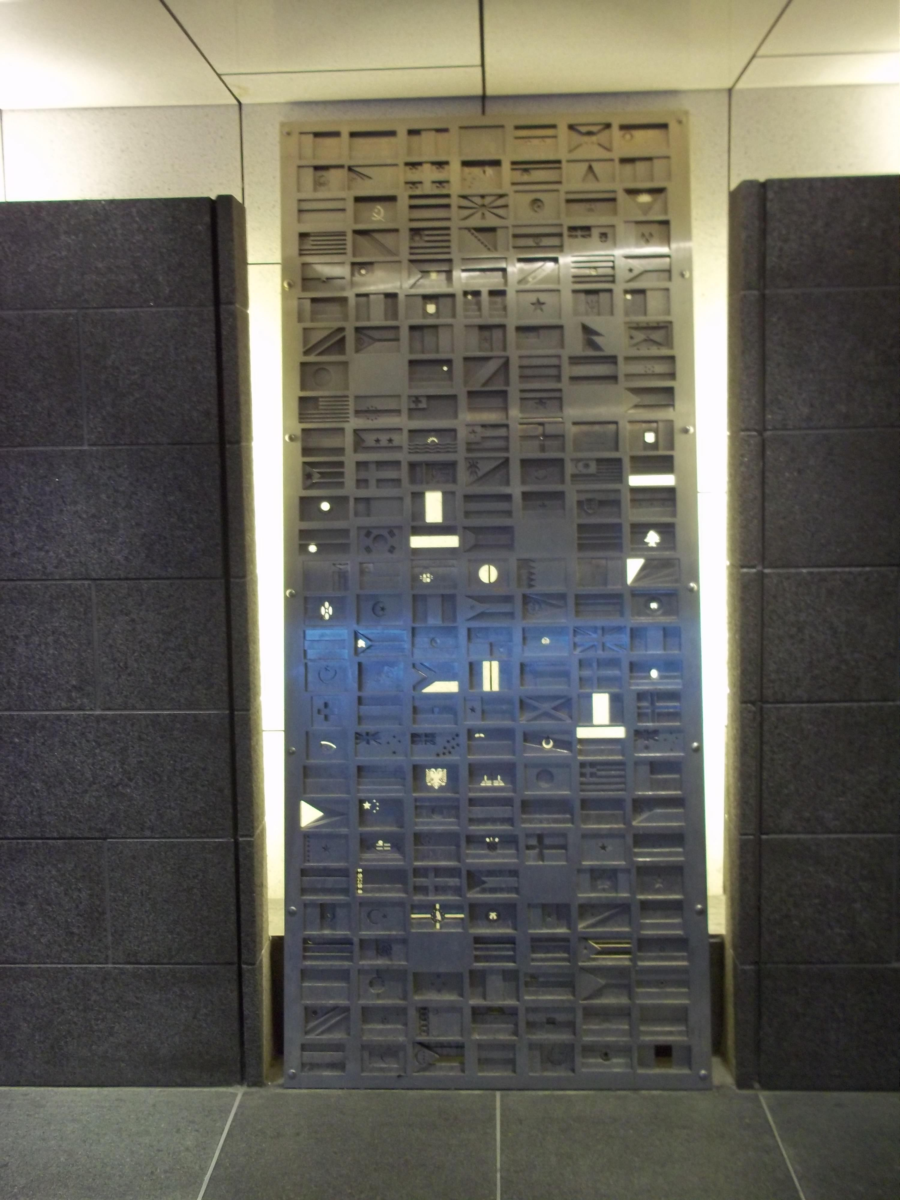 Sculpture de Michel Goulet intitulée Tables, de 2005. Elle est située dans le Montréal souterrain, dans le périmètre du Quartier international de Montréal, à l'entrée de la place Jean-Paul-Riopelle. « J'ai toujours privilégié dans mon travail l'usage d'objets issus du quotidien, des outils, du mobilier domestique mais aussi des signes qui, par convention sociale, sont des précis d'idées et de concepts. Je tiens pour acquis qu'une chaise ou la lettre « A », tout en étant réels, n'ont plus temporairement d'efficacité ou de valeur en soi, mais en tant que signes de quelque chose d'autre. La fonction symbolique de l'art est mieux servie par des associations d'images (ou d'objets) qui animent l'esprit que par celles qui illustrent ou racontent. »